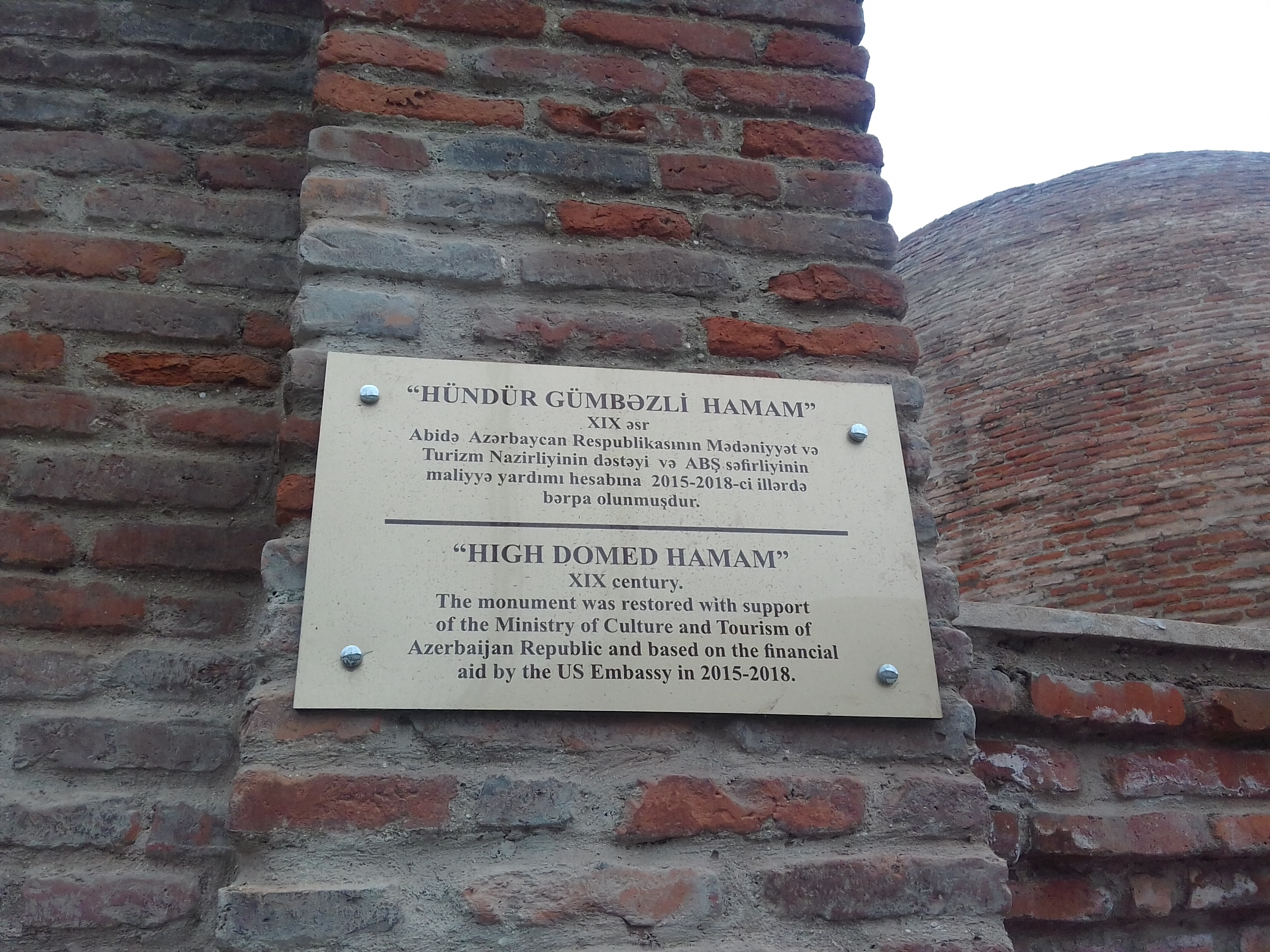 Hündür günbəzli hamam